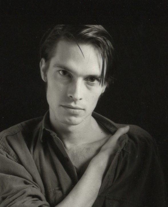 Portrait